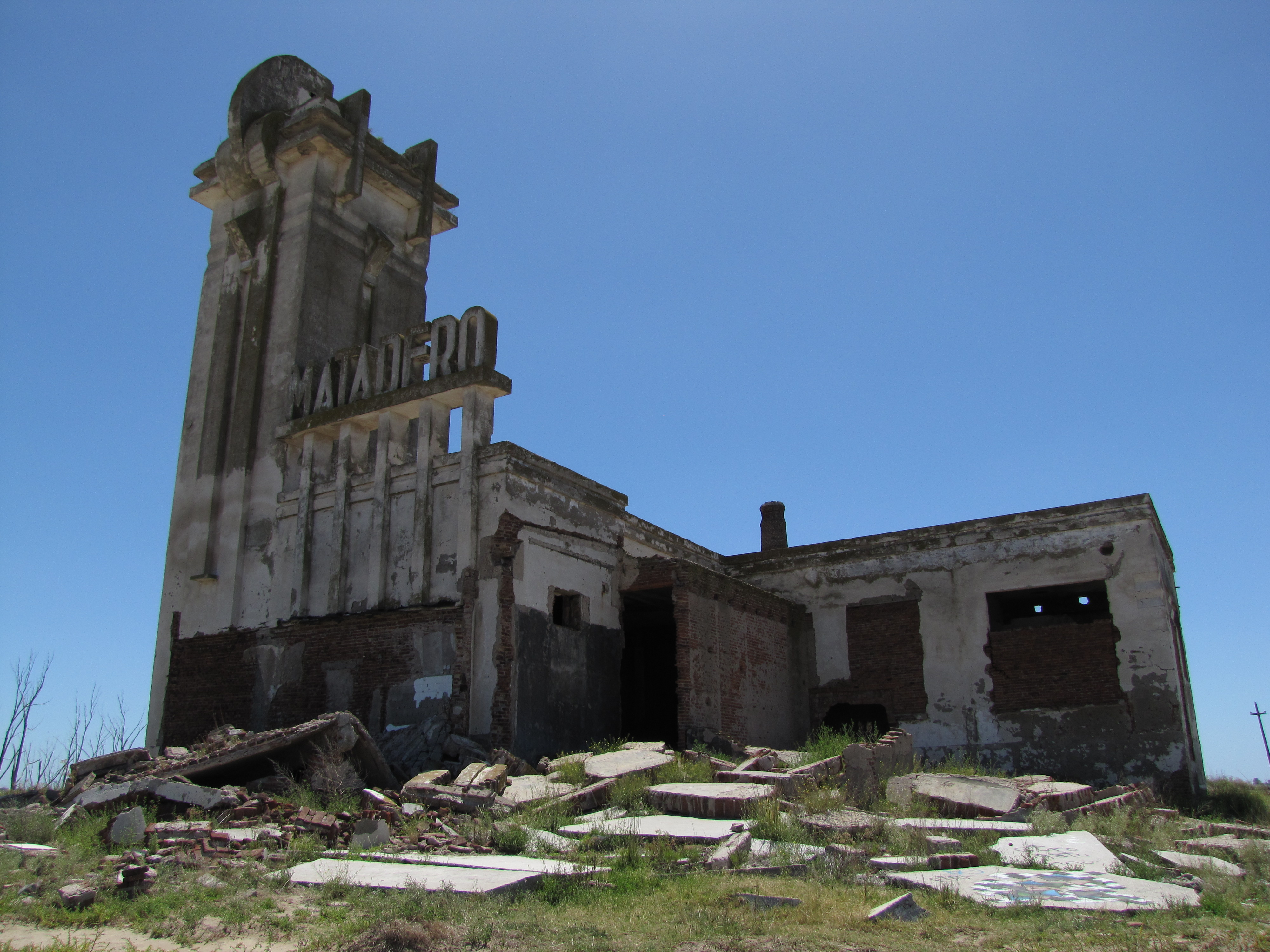 Matadero Municipal de Villa Epecuén